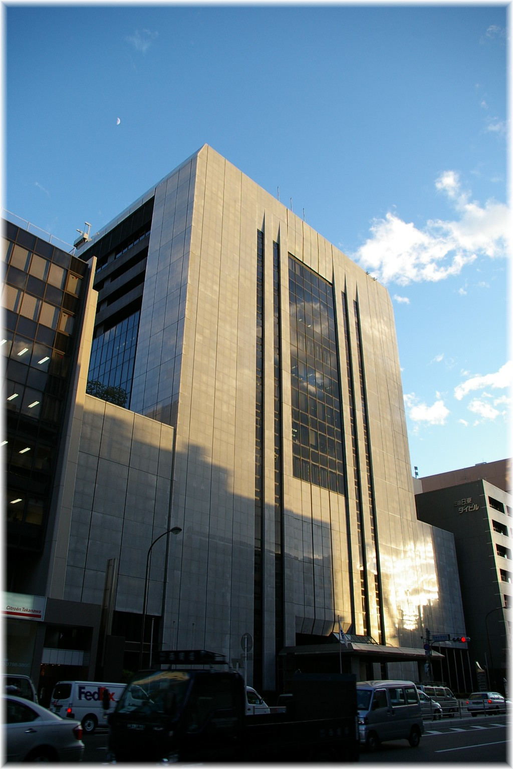 Ich machte dieses Foto von mir in 2006. 笹川記念館